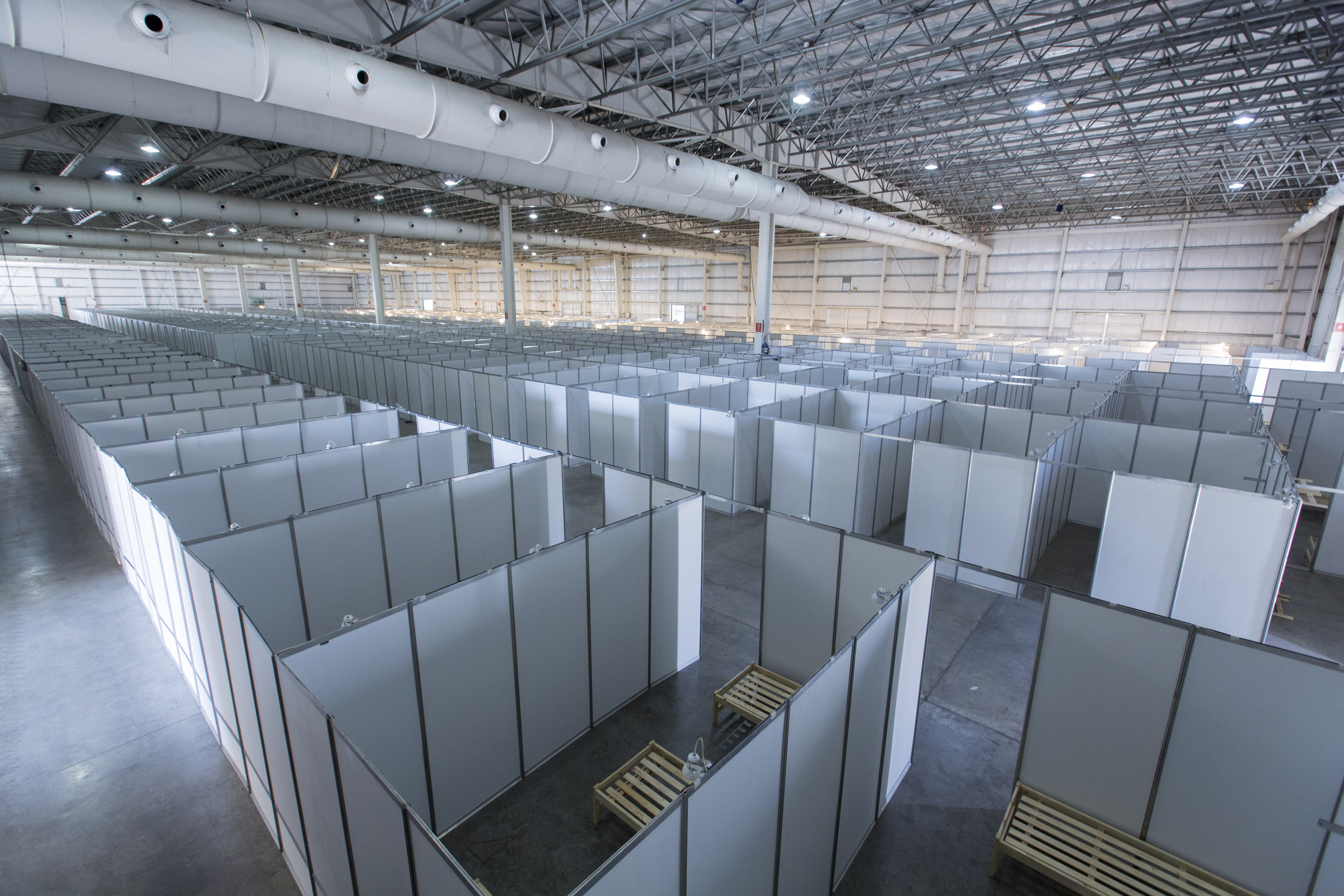 Villa Martelli, 30 de abril de 2020.- El ministro de Cultura de la Nación, Tristán Bauer y representantes de Cascos Blancos recorrieron Tecnópolis, que se convertirá en el centro sanitario más grande del país. Fotos: Augusto Starita - Ministerio de Cultura de la Nación.